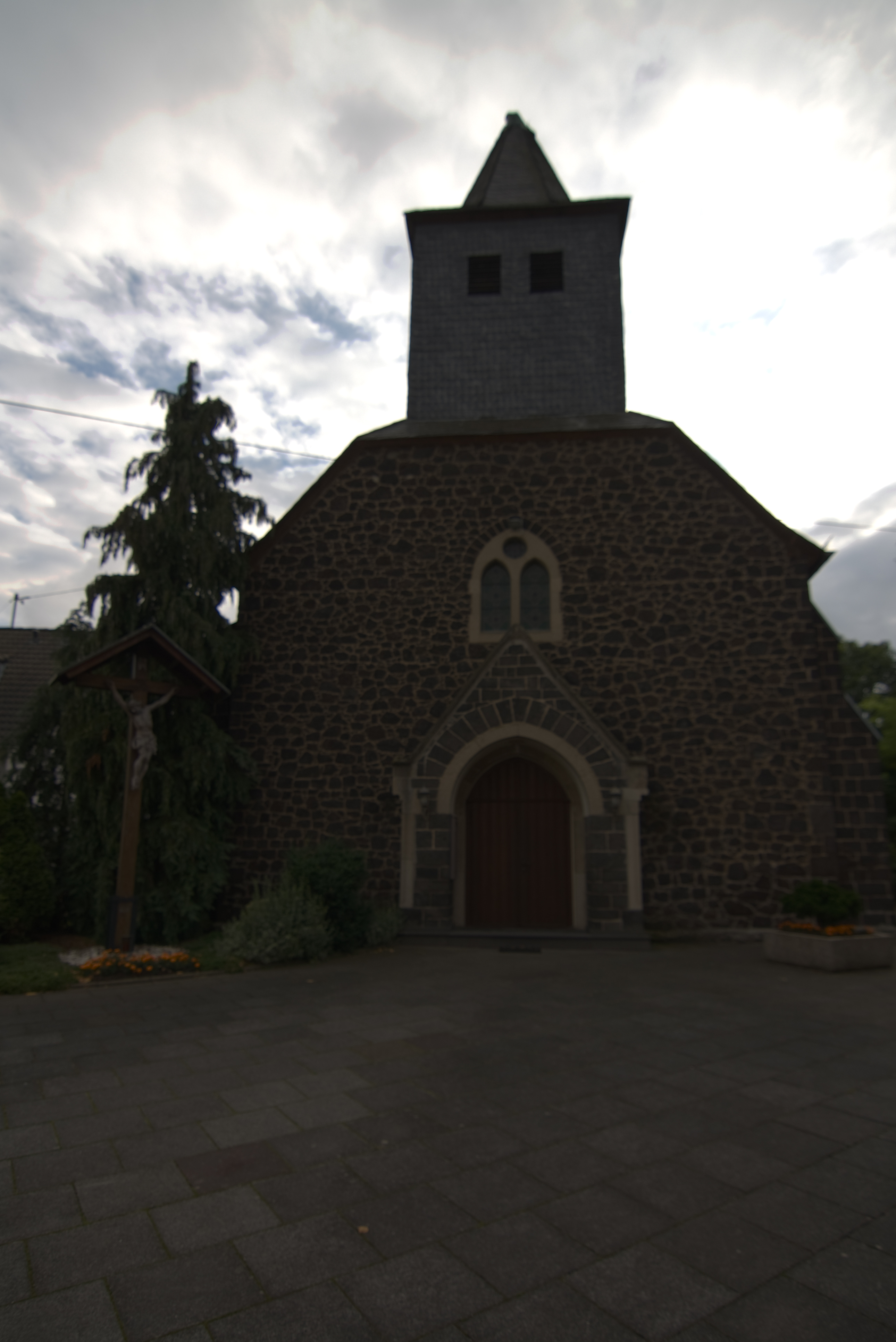 Kath. Kapelle Str. Nikolaus in 56751 Gering